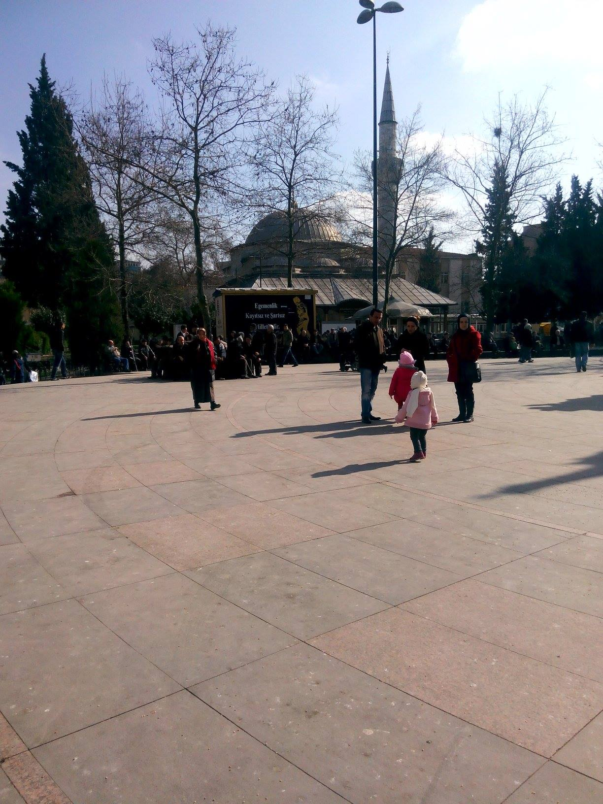 Çorlu il merkezinden yer yer görüntüler.